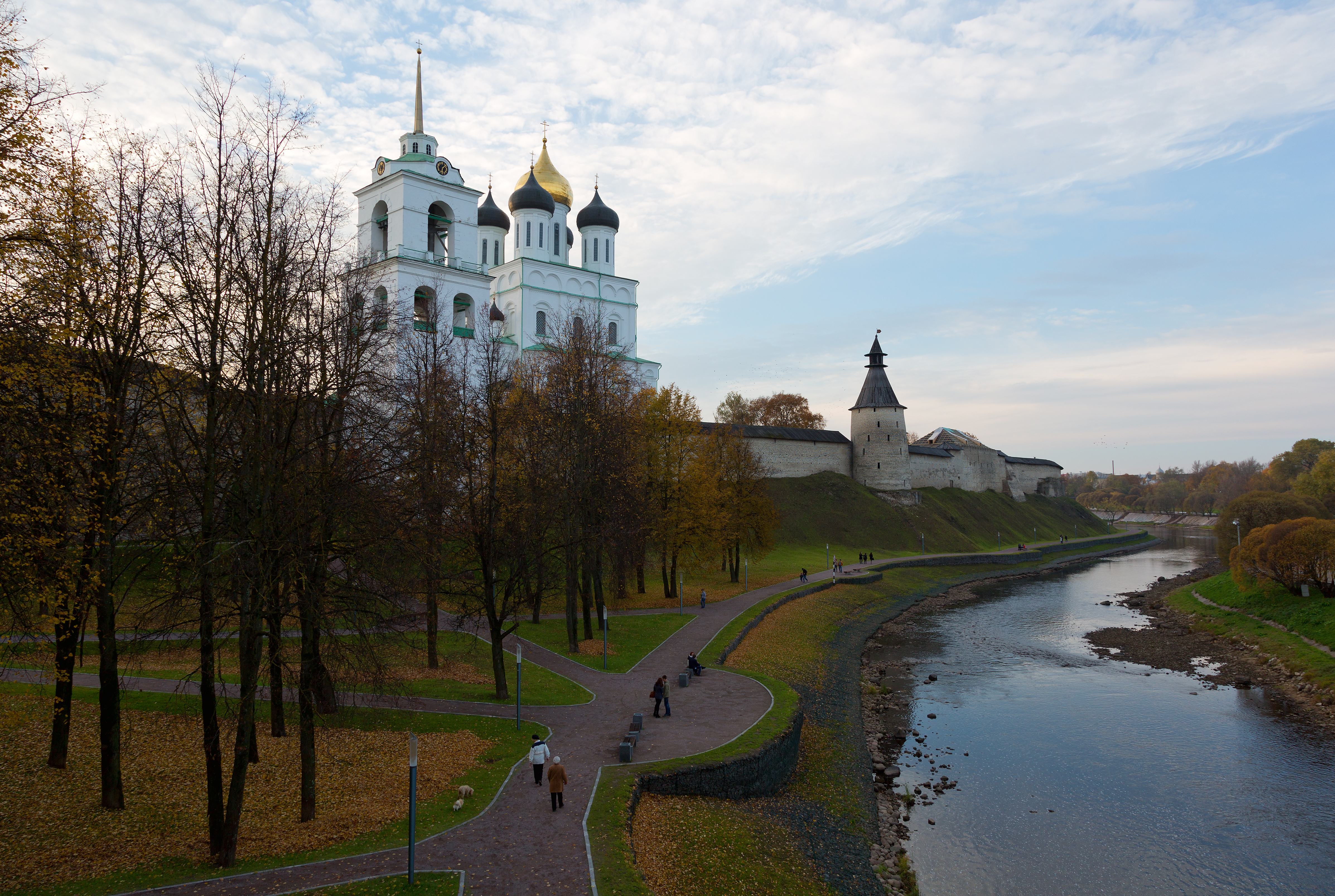 Собор Троицкий (Троицкий кафедральный собор с колокольней) (Псковская область, Псков, Кремль)